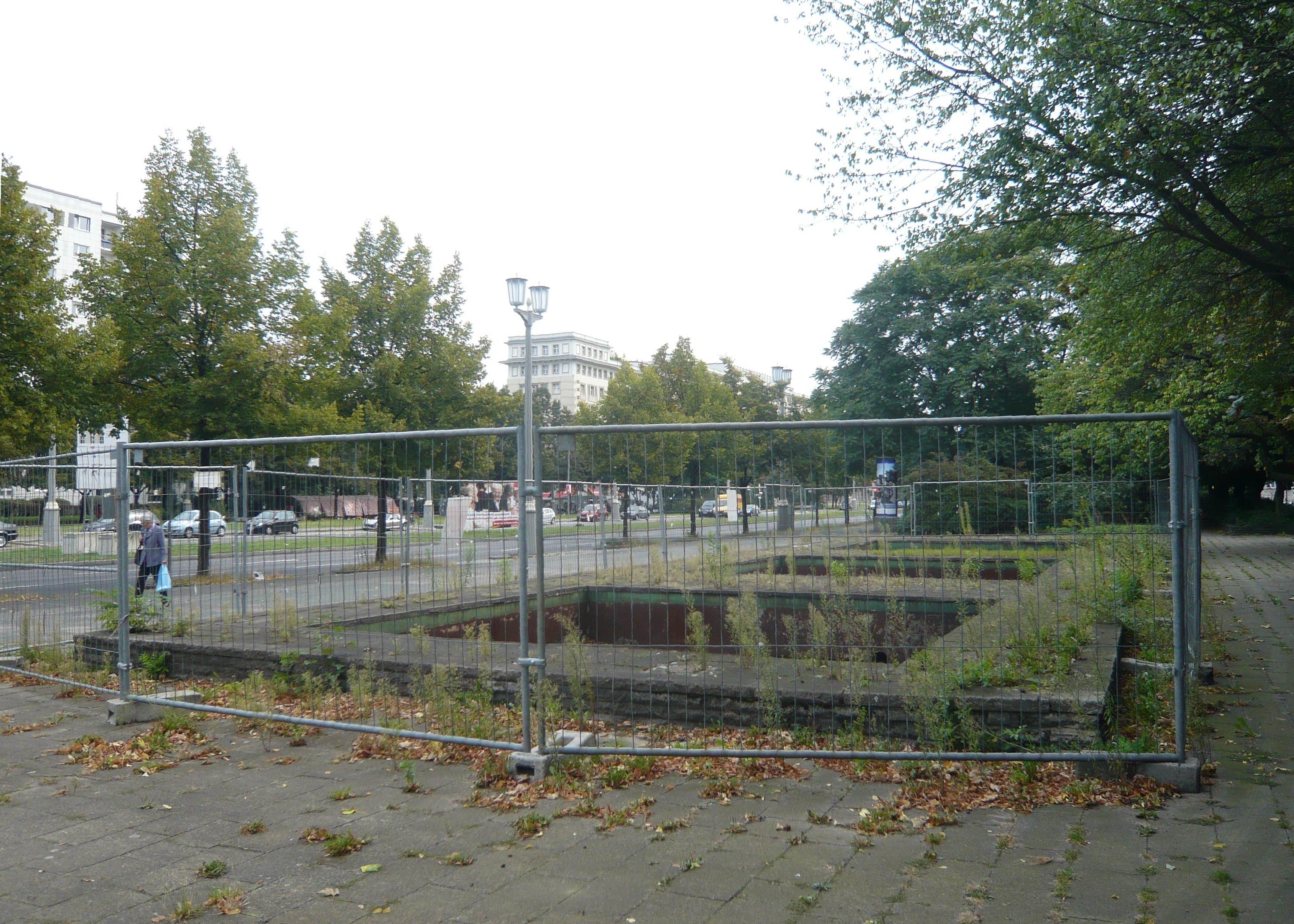 ehemaliger Standort des Berliner Stalindenkmals